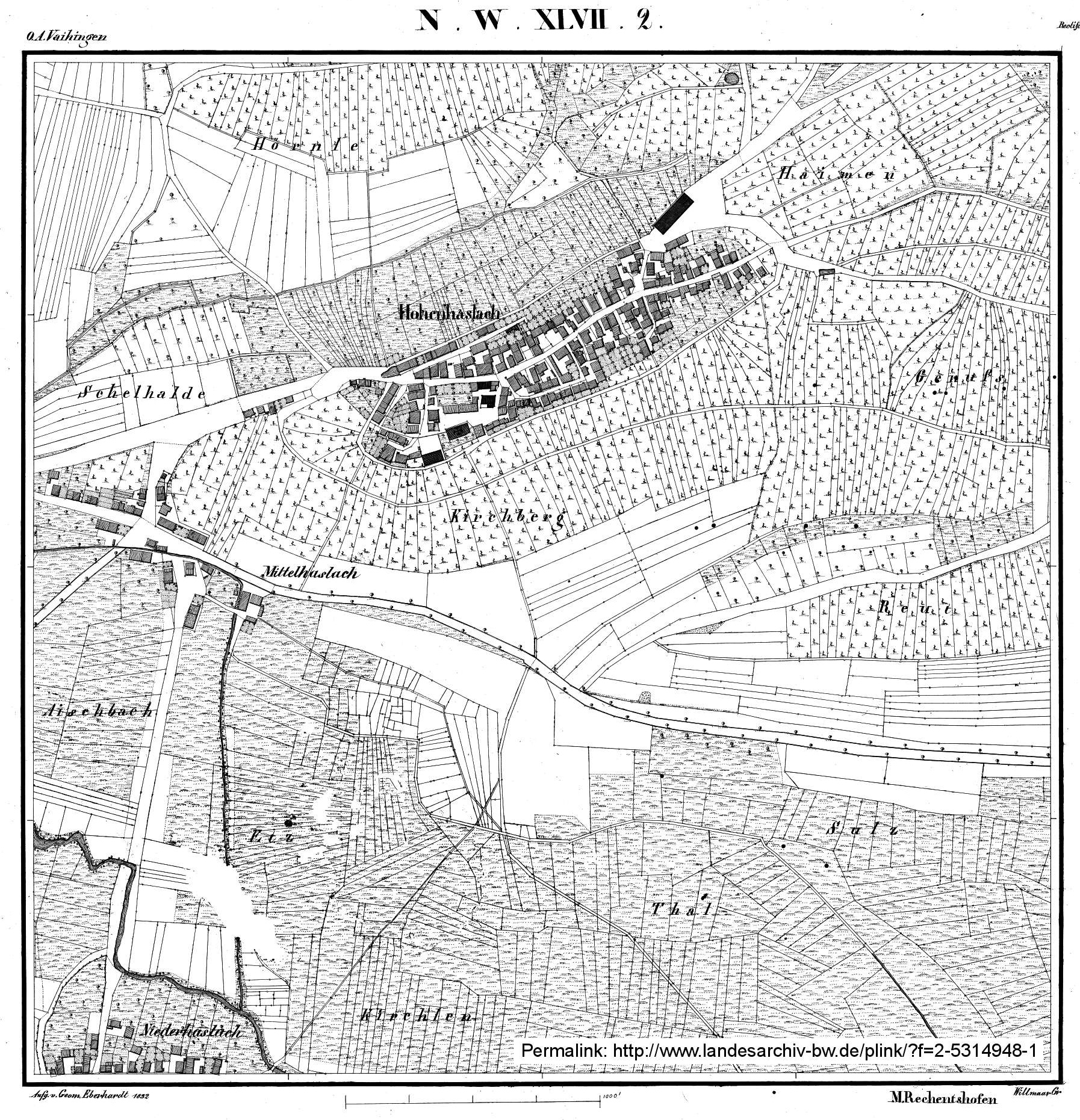 Hohenhaslach mit Mittel- und Niederhaslach auf der Urflurkarte NW XLVII, Blatt 2, von 1832